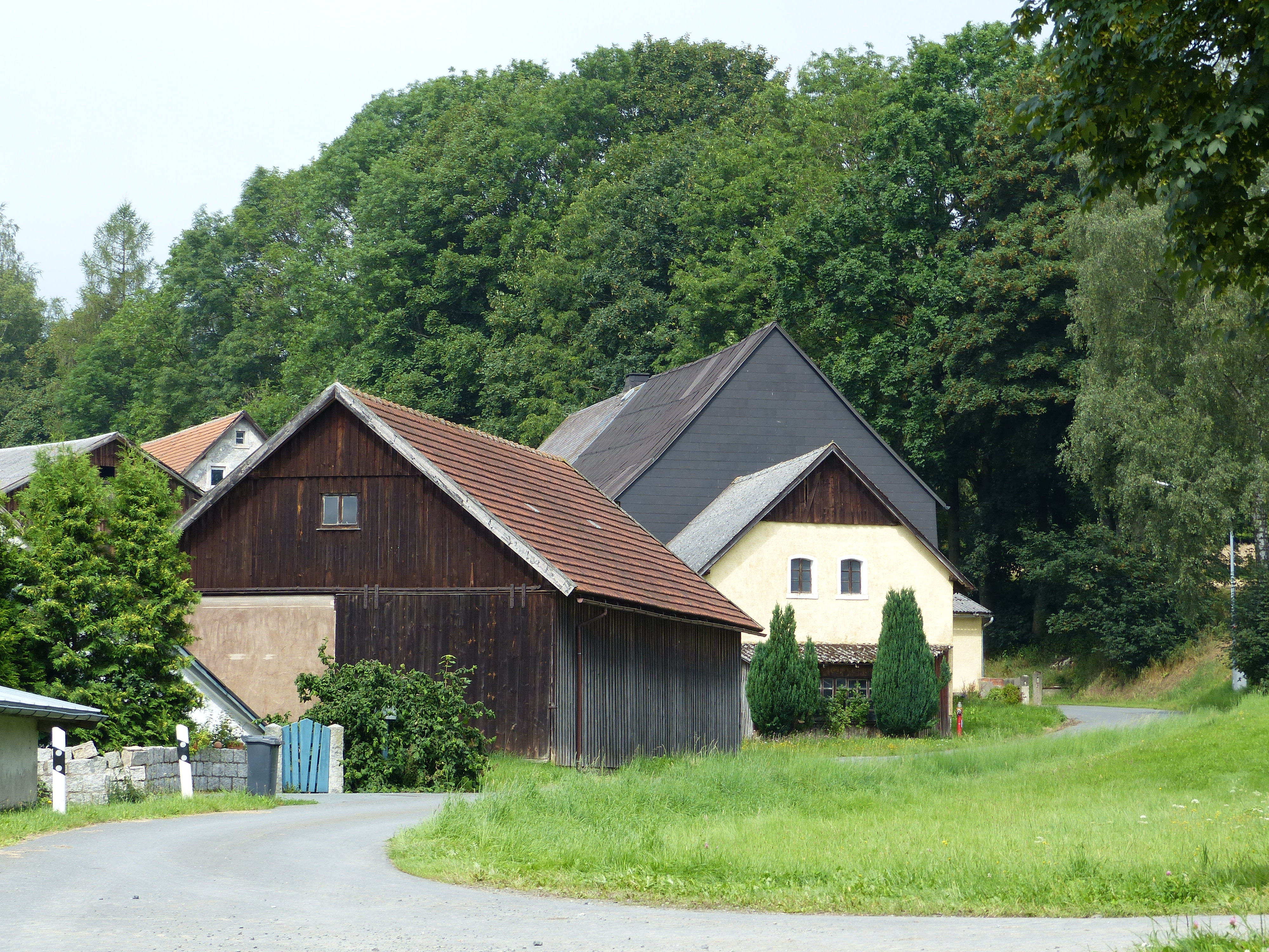 Serie Ansichten vom Weißenstein